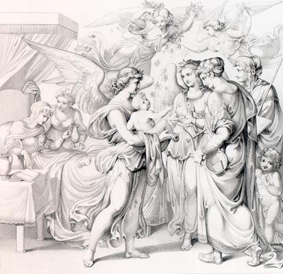 Raffaello Sanzios Geburt am Charfreitag 1483